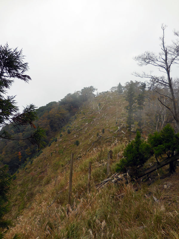 岳滅鬼岳頂上の様子